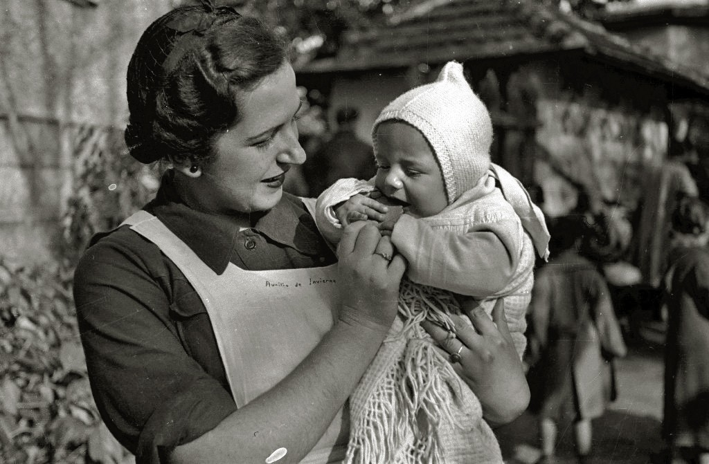 Título original: Reparto de comida por mujeres de la Sección Femenina (10/14) Localización: Guipúzcoa